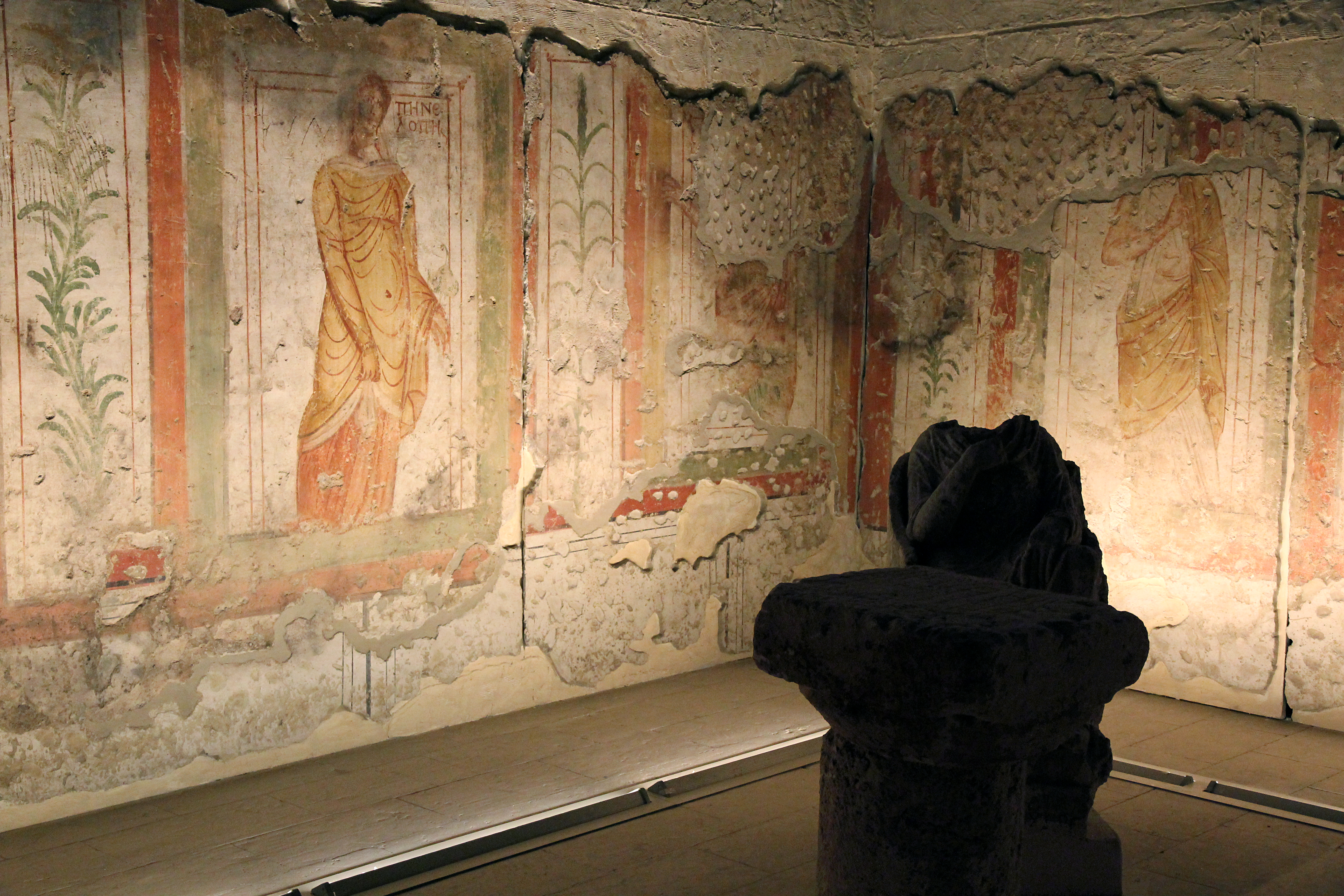 Zeugma-Mosaik-Museum, Gaziantep, Türkei, Wandmalereien aus Zeugma